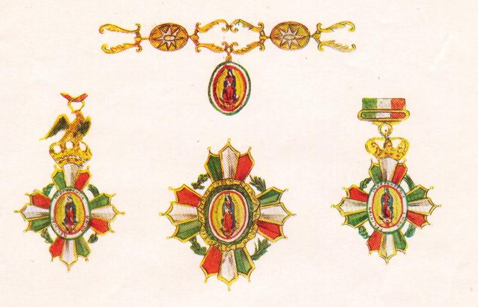 Insignias de la Orden Imperial de Nuestra Señora de Guadalupe